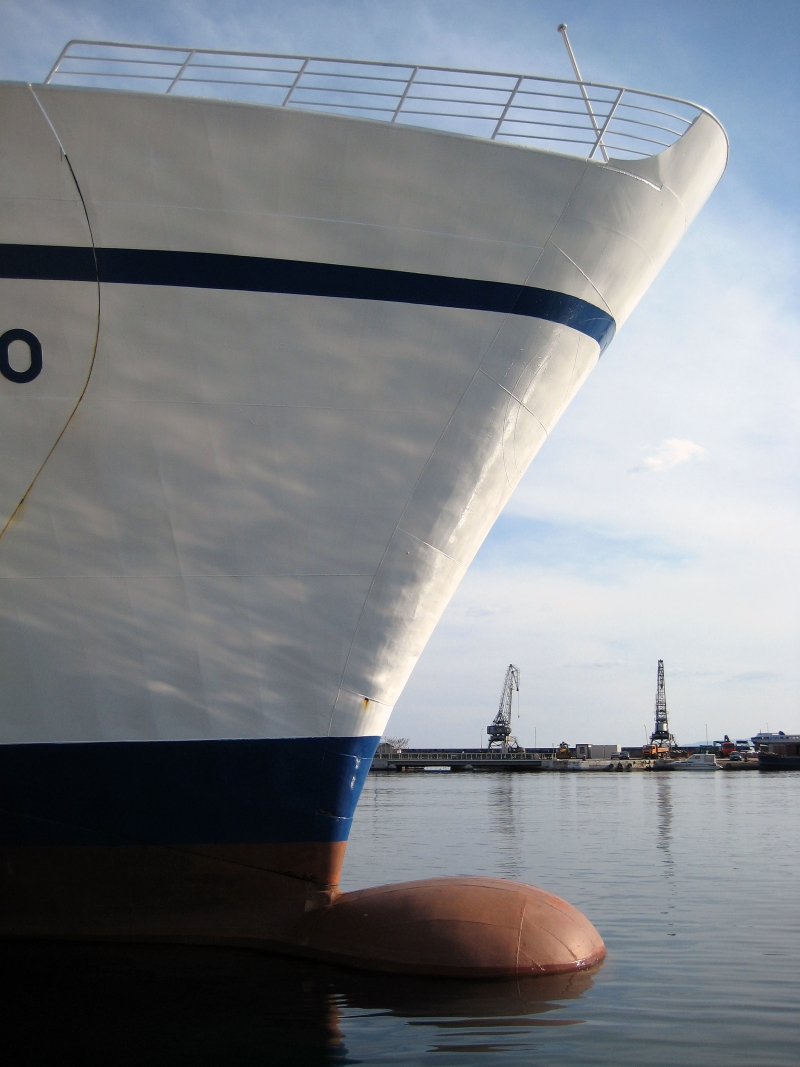 Jadrolinijin trajekt Marko Polo